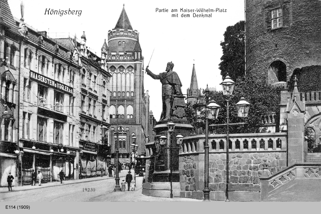 Königsberg